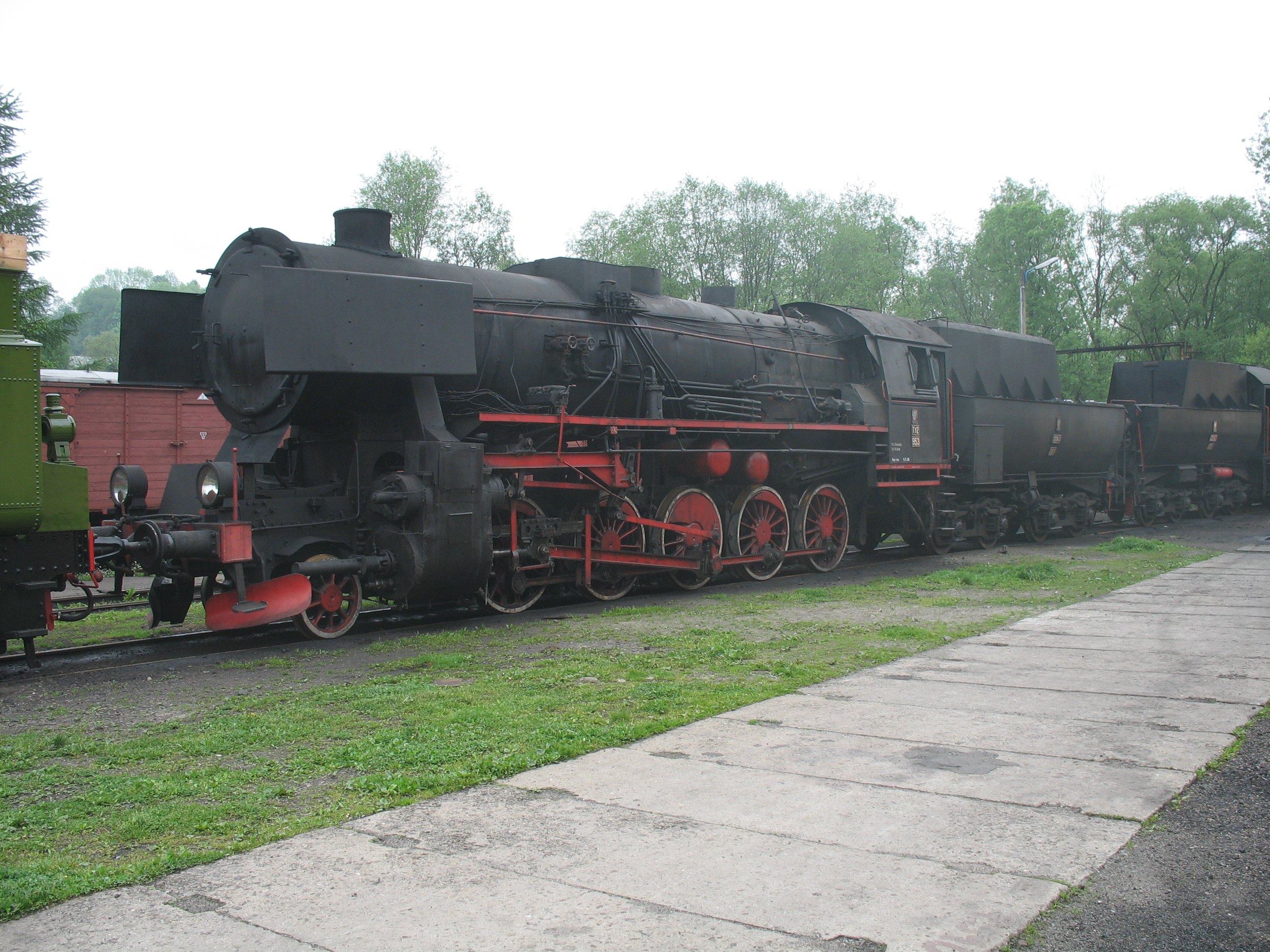 Lokomotywa parowa Ty2-953 zbudowana w 1944 roku przez Henschel & Sohn w Kassel. Eksponat Skansenu w Chabówce.